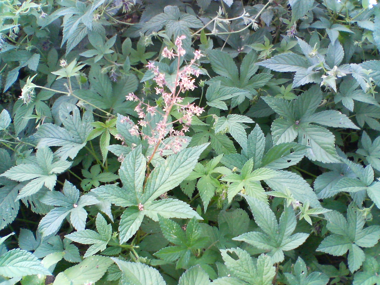 Humulus japonicus, Japanese hop